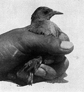 Marouette de Laysan (Porzana palmeri) dans une main